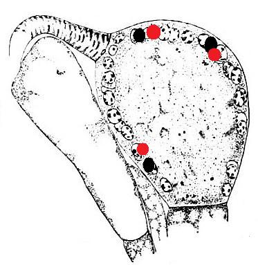 Pyronema omphalodes de Handbuch der Systematischen Botanik (1924)